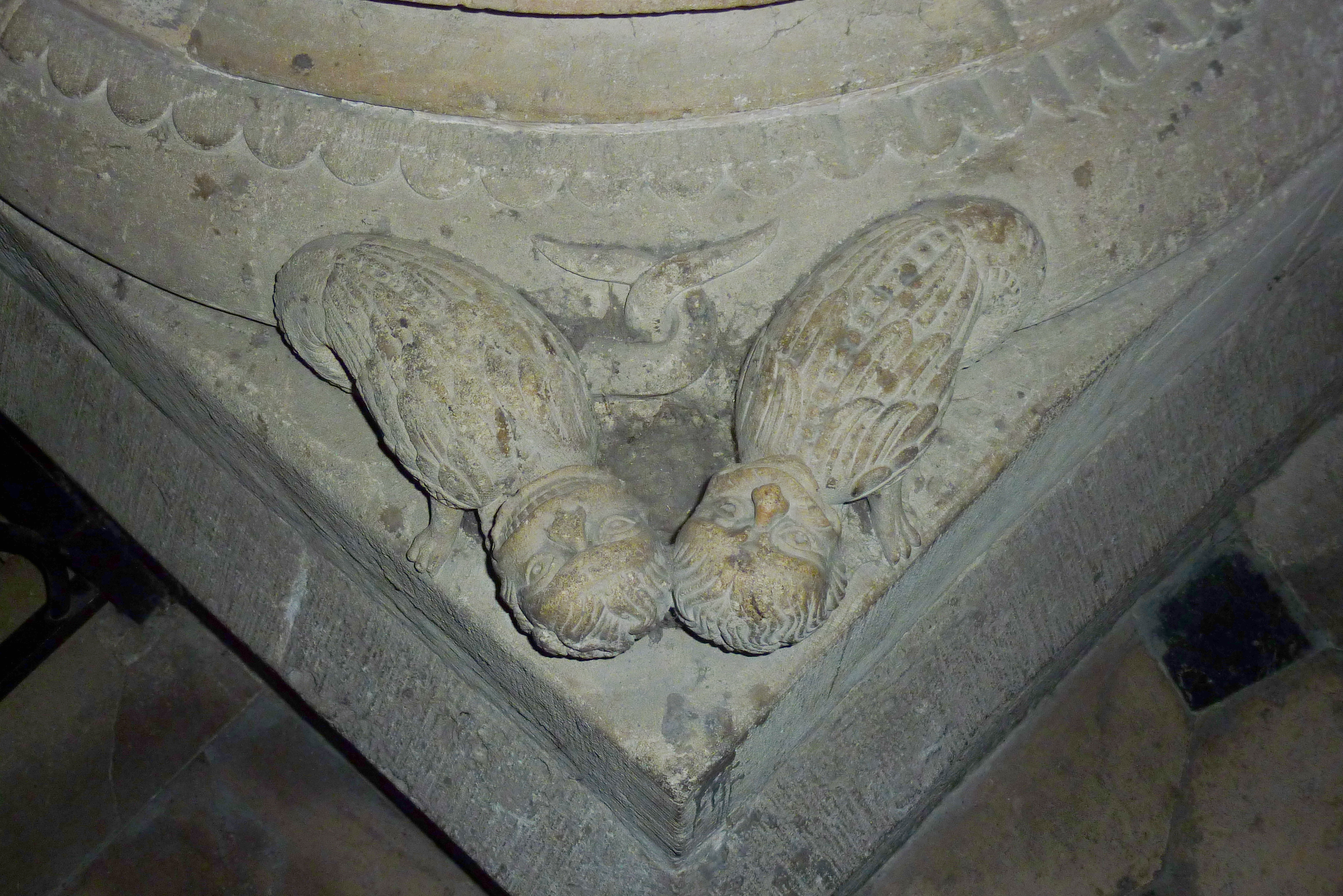 katholische Pfarrkirche Notre-Dame in Poissy, Eckblatt)